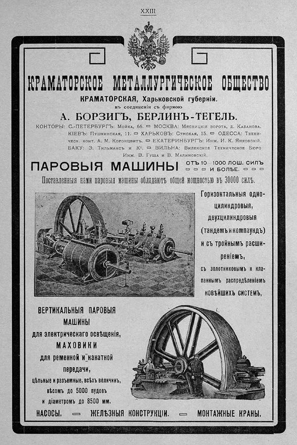 Реклама Краматорского металлургического общества